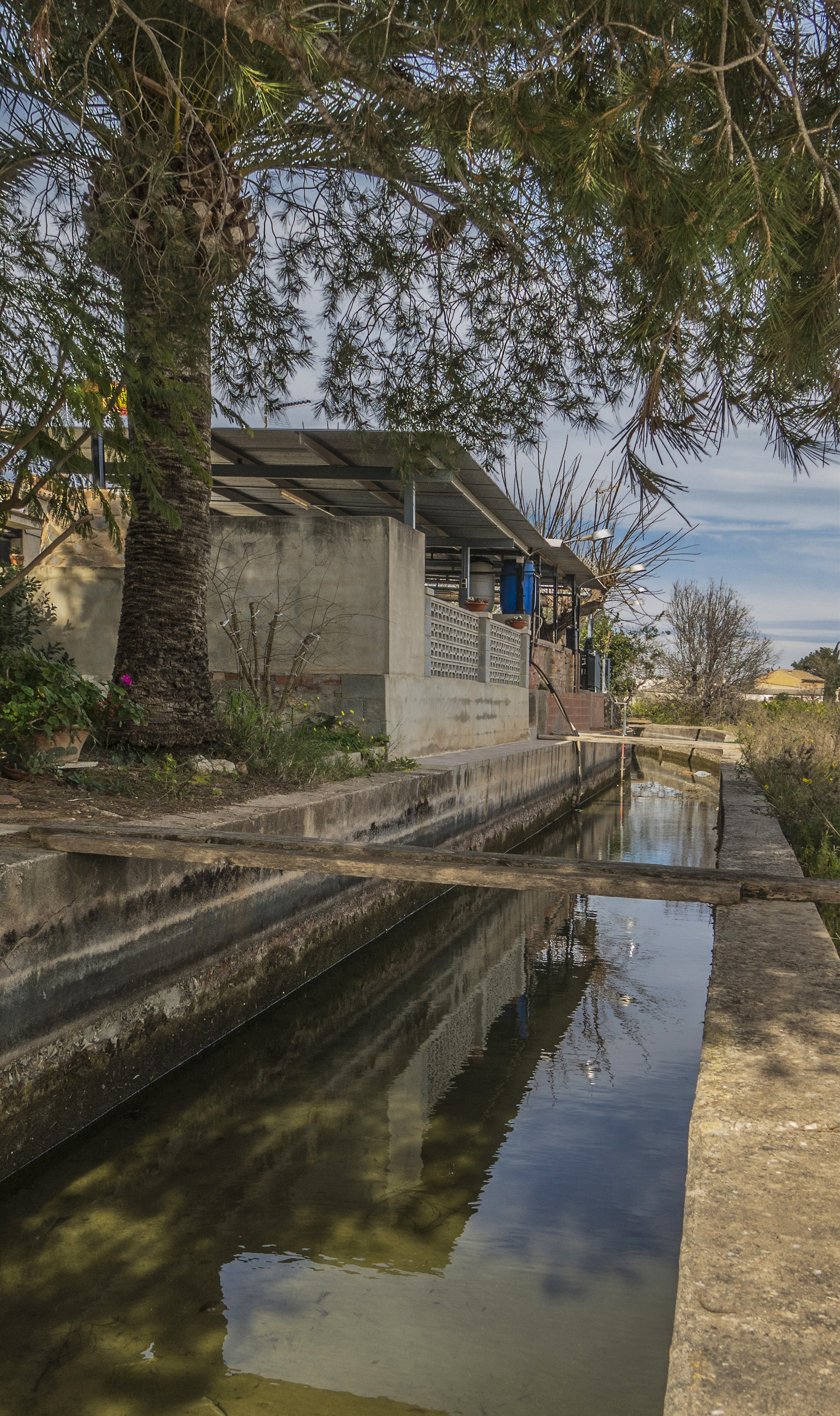 Imatge feta a la Garrofera (terme d'Alzira del País Valencià) Canal dels regants valencians.